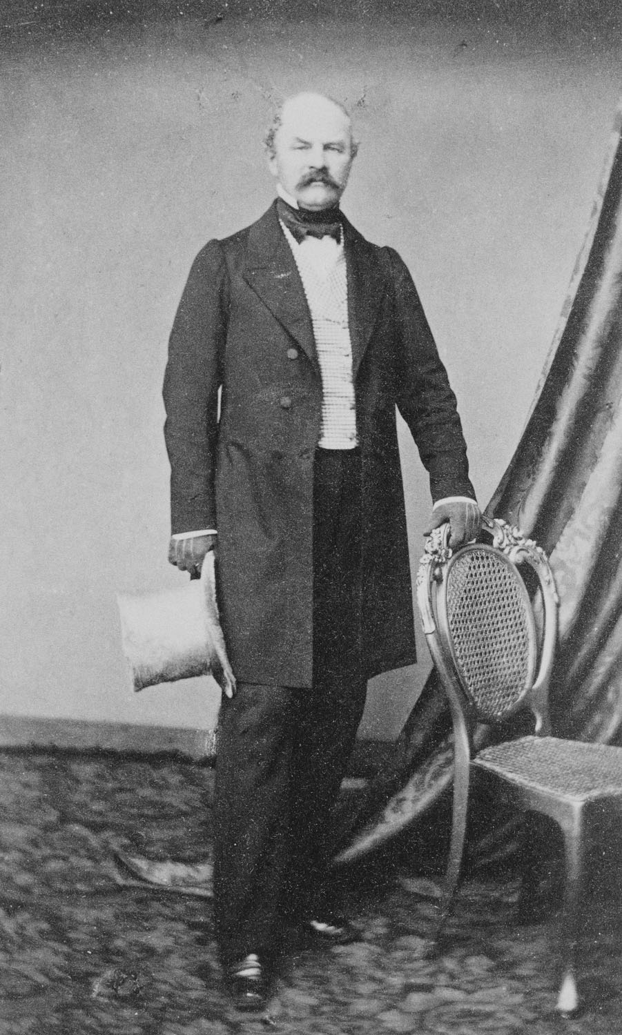 Prinz Friedrich vvon Württemberg (1808-1870), Vater des Königs Wilhelm II.